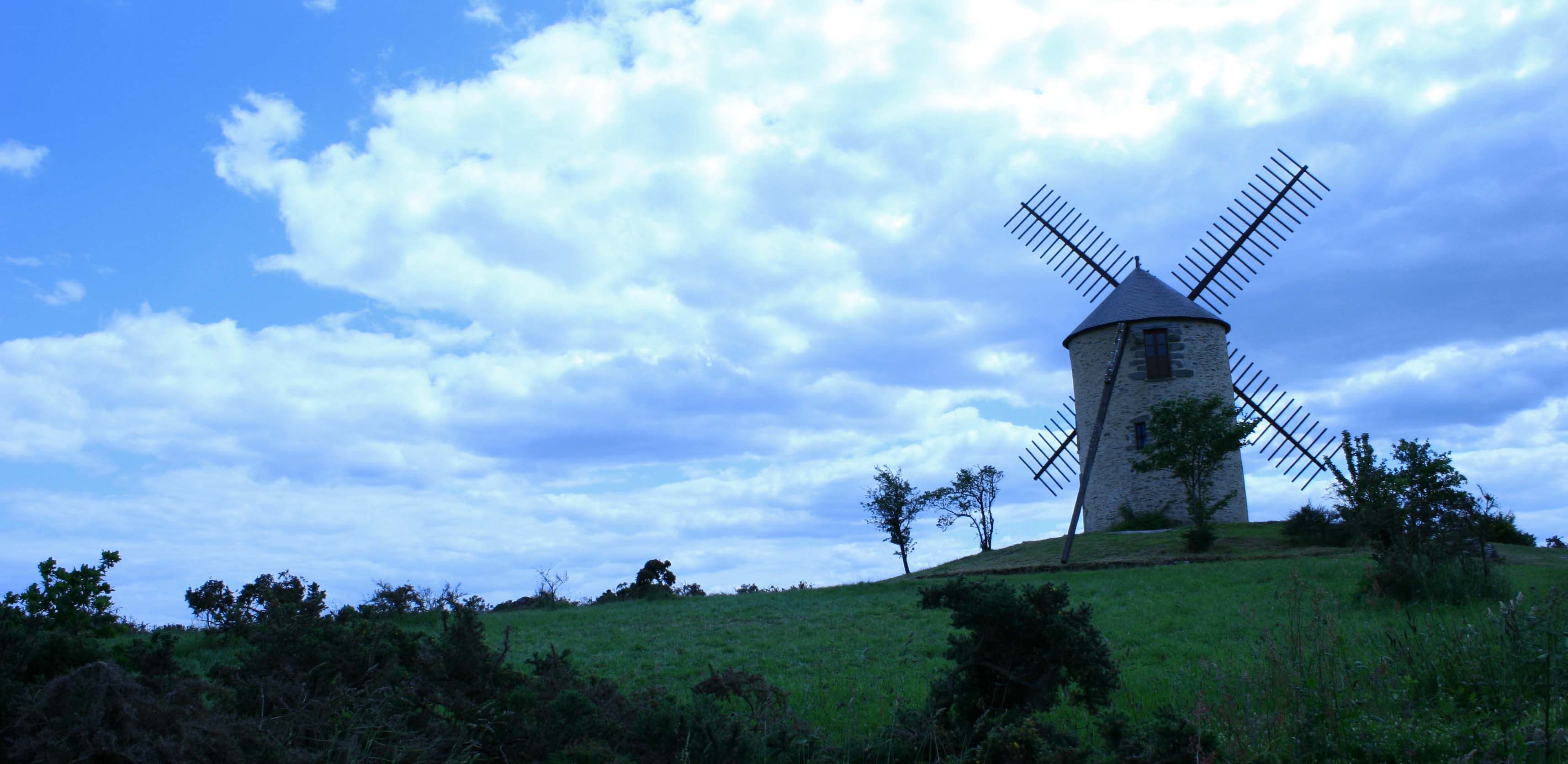 Butte des moulins - france - Morbihan - St-jacut les Pins